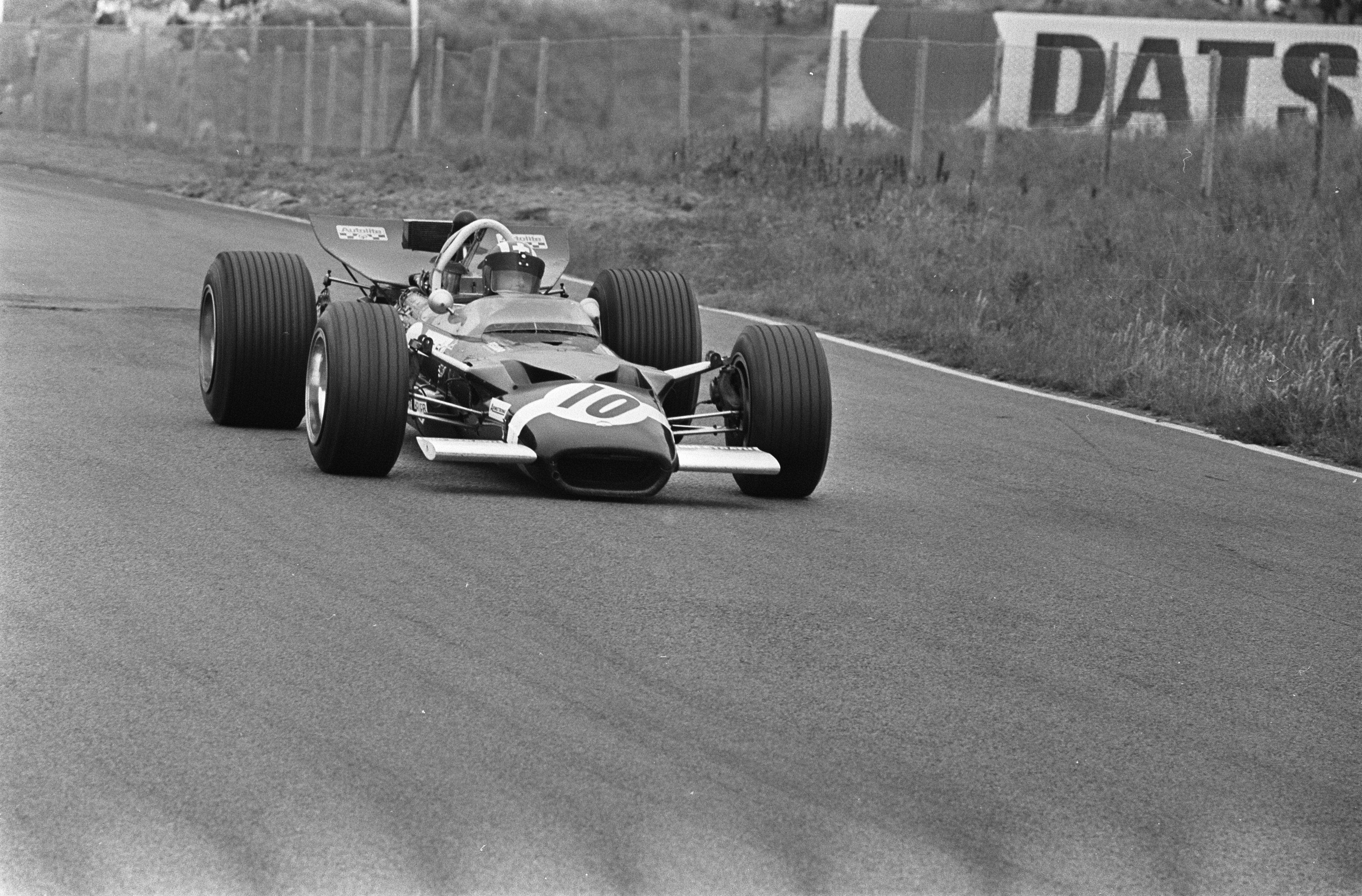 Nr. 18 in actie.